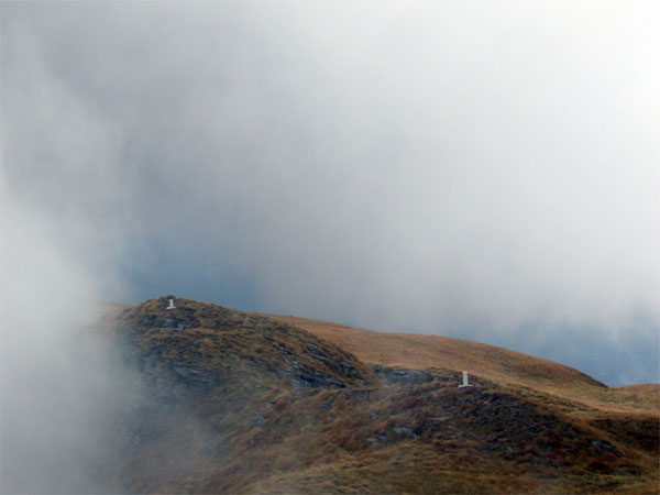 Stara planina - Midzor